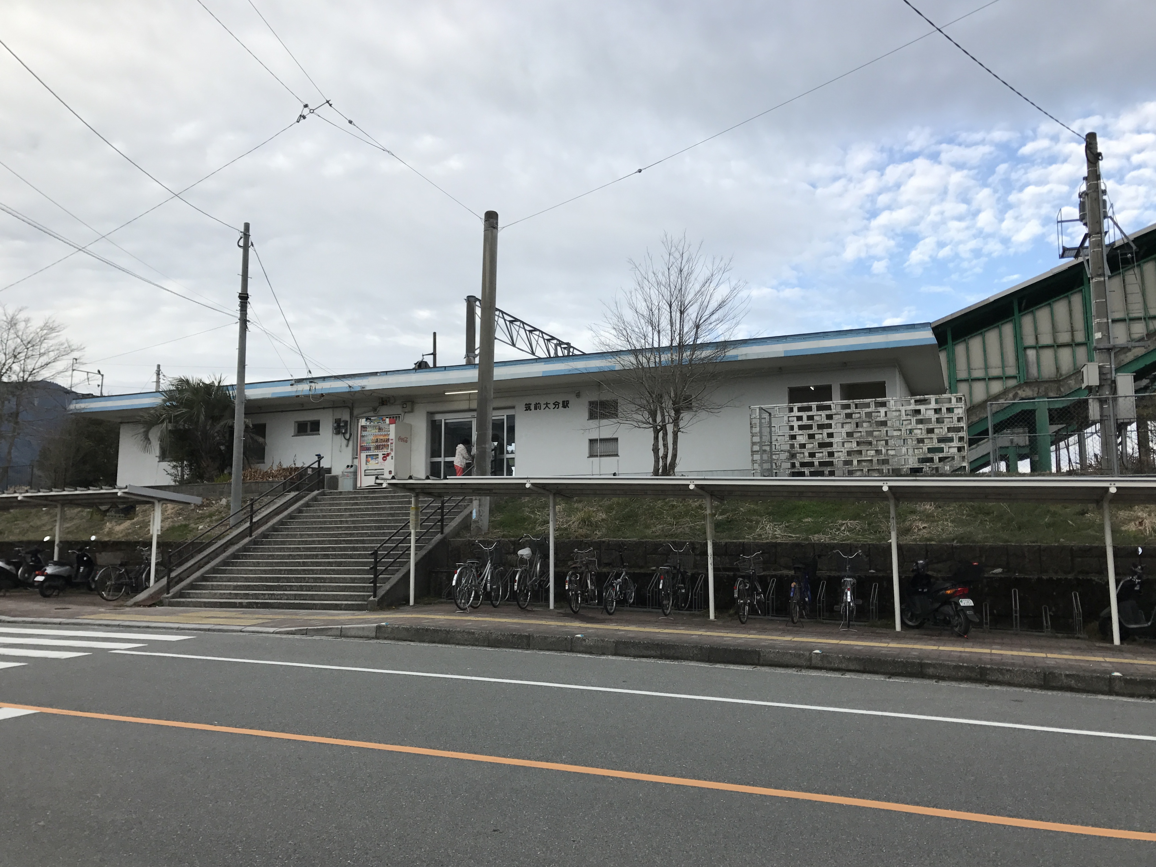 筑前大分駅駅舎